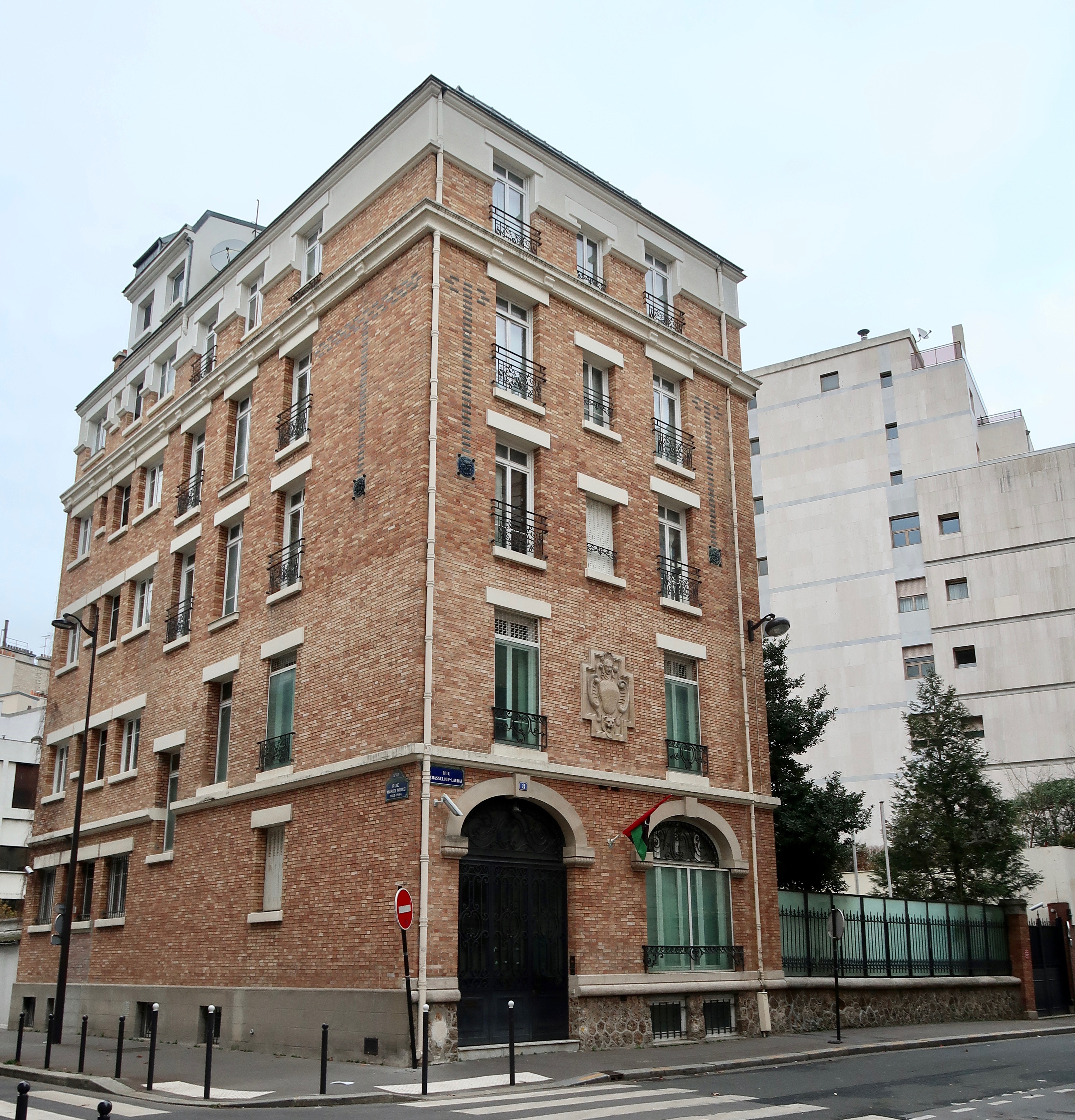 Ambassade de Libye en France, 6-8 rue Chasseloup-Laubat (Paris, 15e).